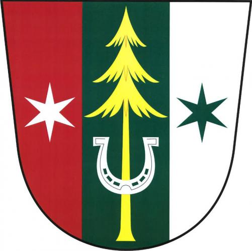 Znak, Bušín, okres Šumperk